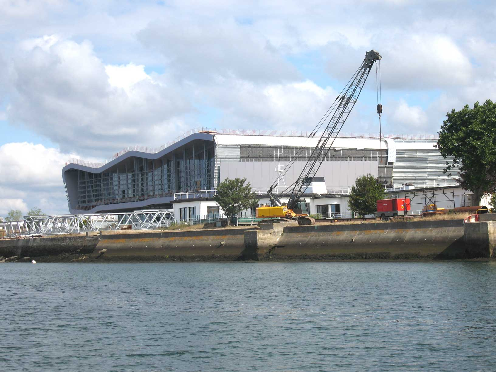 Description : Cité de la voile Éric Tabarly Place : Lorient, Bretagne, France Date : 2006 Auteur : Pline